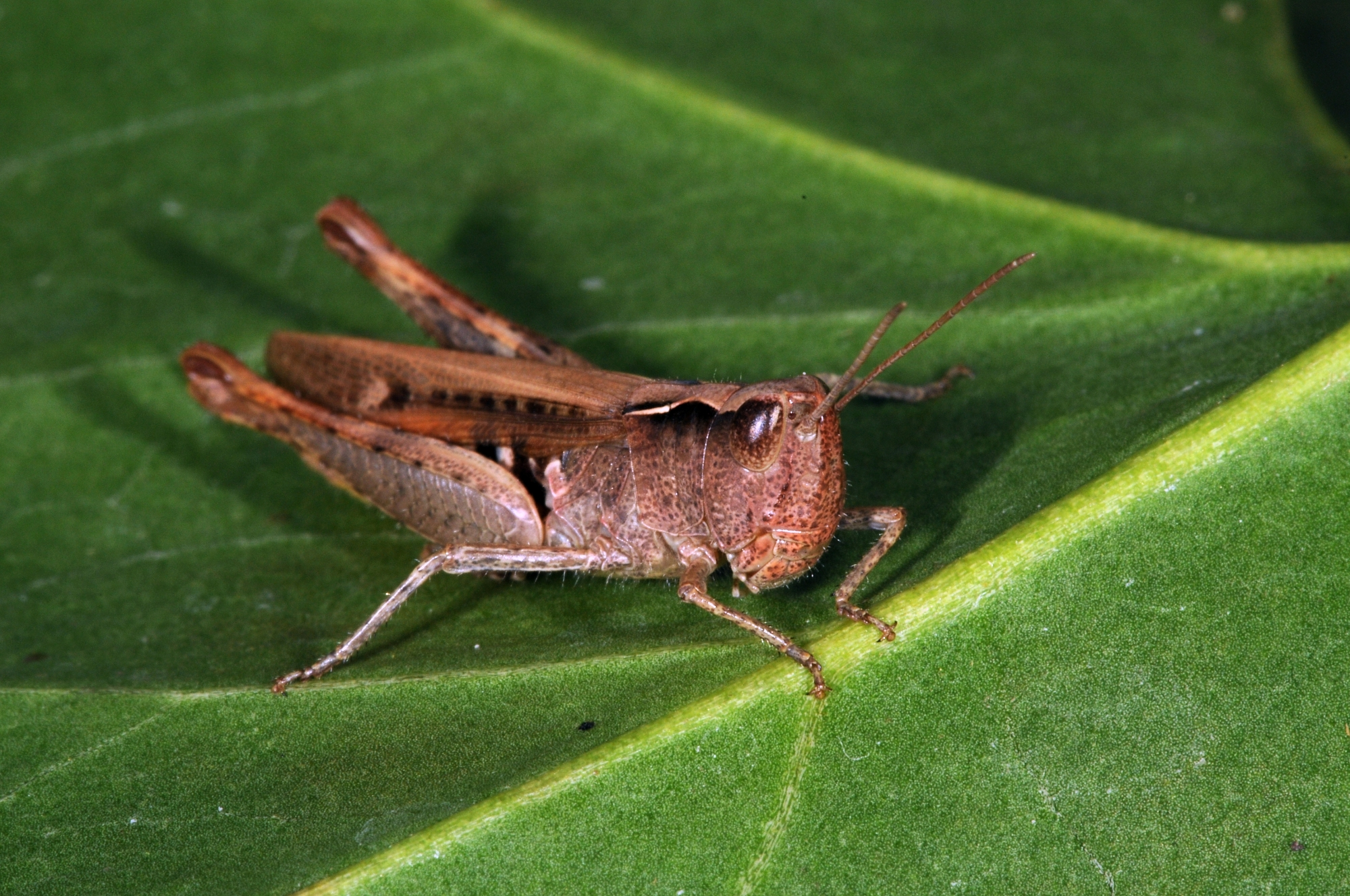 Chorthippus vagans, Männchen, Mainzer Sand, Rheinland-Pfalz, Deutschland